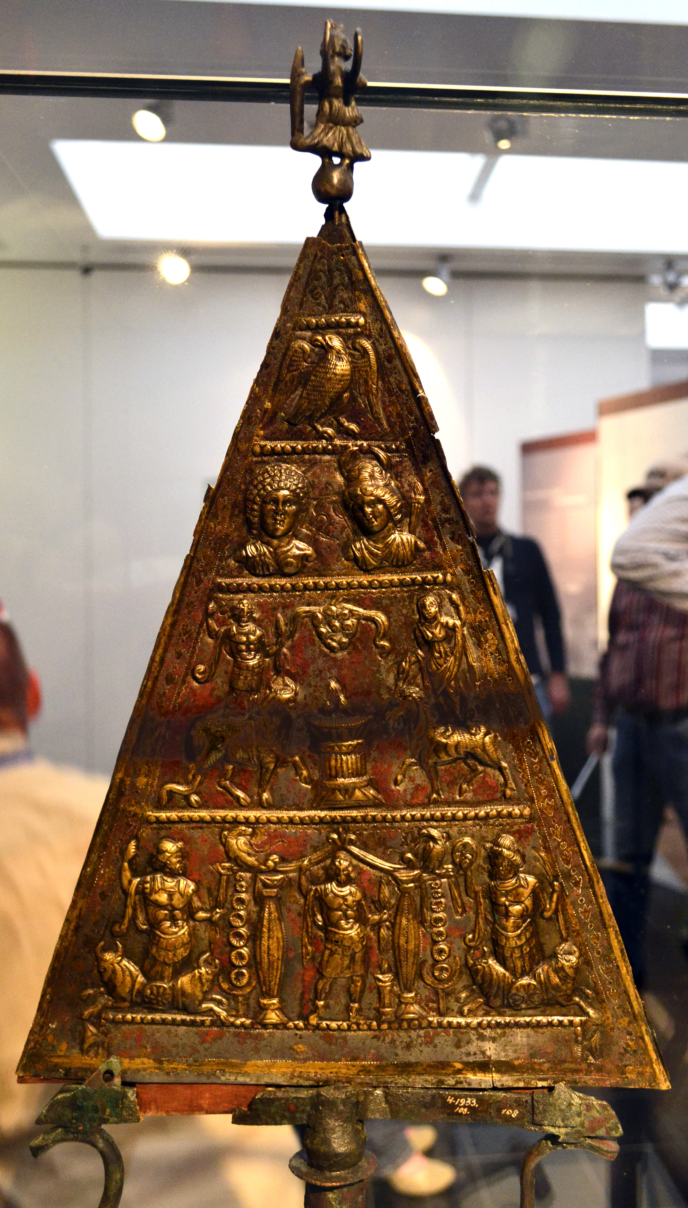 Dolichenus Votivdreieck mit Statuette der Victoria aus Lussonium/Dunakömlőd, 2.-3. Jahrhundert, Römermuseum Osterburken, Leihgabe des Ungarischen Nationalmuseums in Budapest. 4. Wikipedia Limeskongress in Hesselbach.